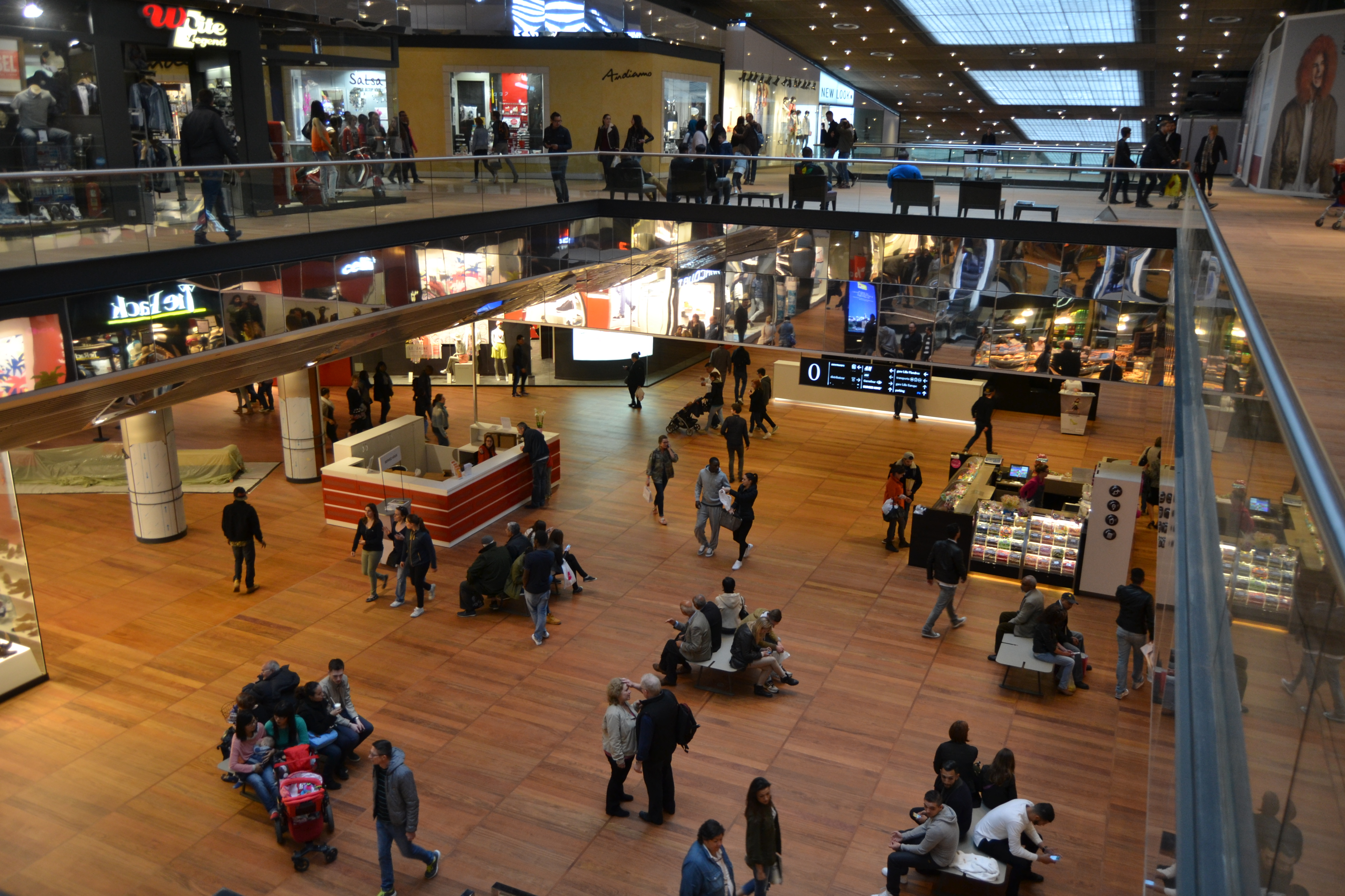 Intérieur du centre commercial Euralille en journée.